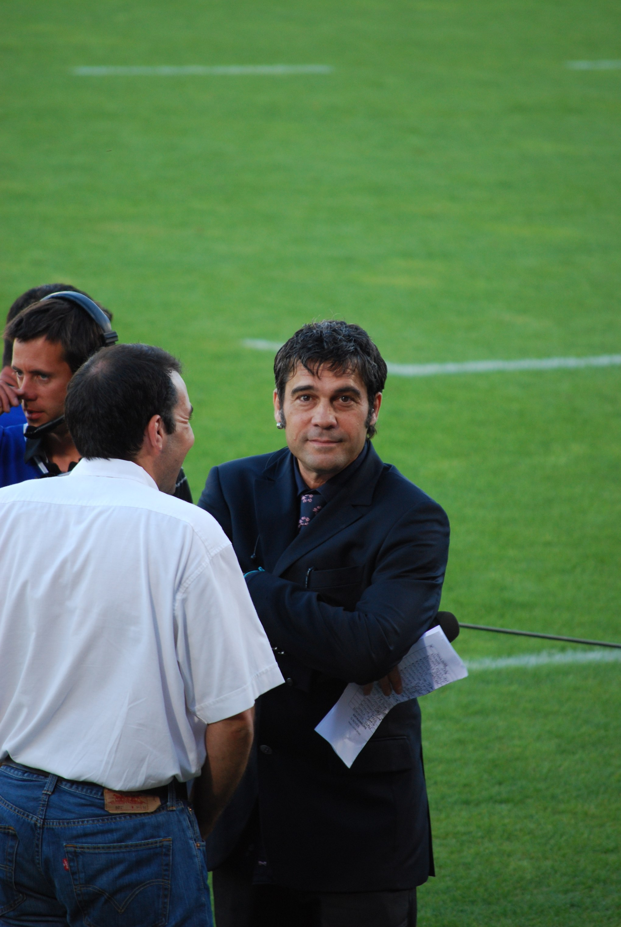 Philippe Guillard lors de la demi-finale Toulouse/Clermont du top 14 2008-2009